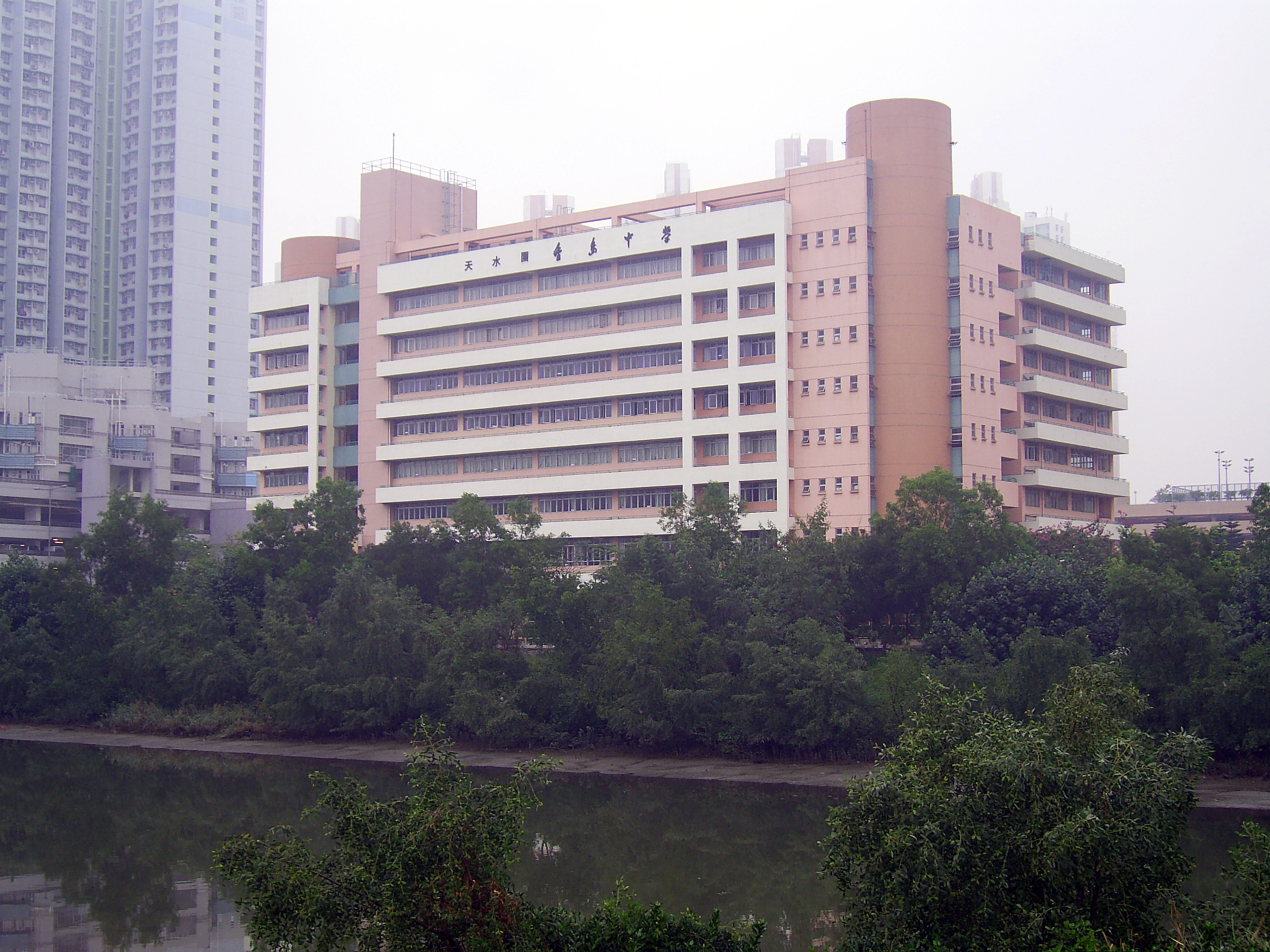 中文（香港）: 天水圍香島中學